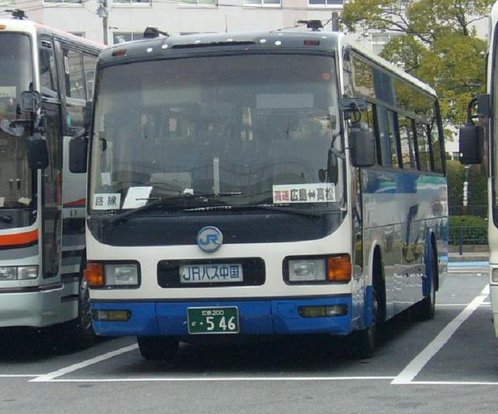 登録番号 広島200か・546 中国ジェイアールバス(Chugoku JR bus)広島支店所属 瀬戸内エクスプレス号用